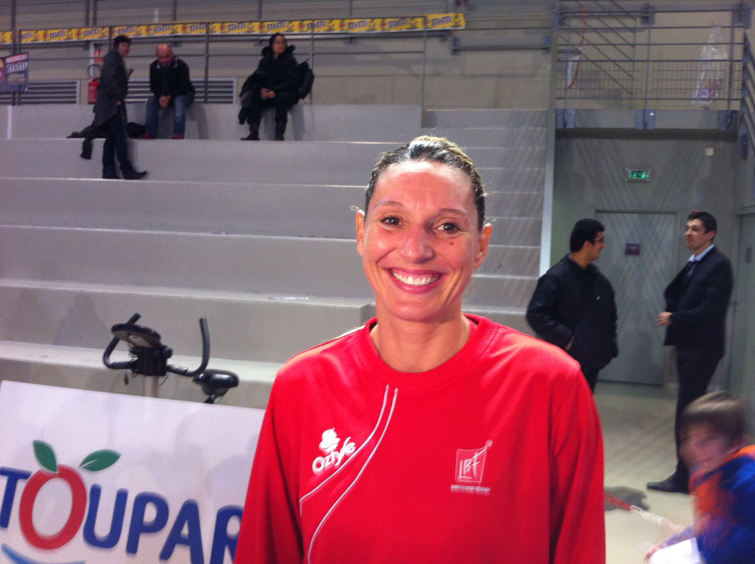 Le 20 janvier 2013 à Lyon après la rencontre Lyon BF-Nantes Rezé